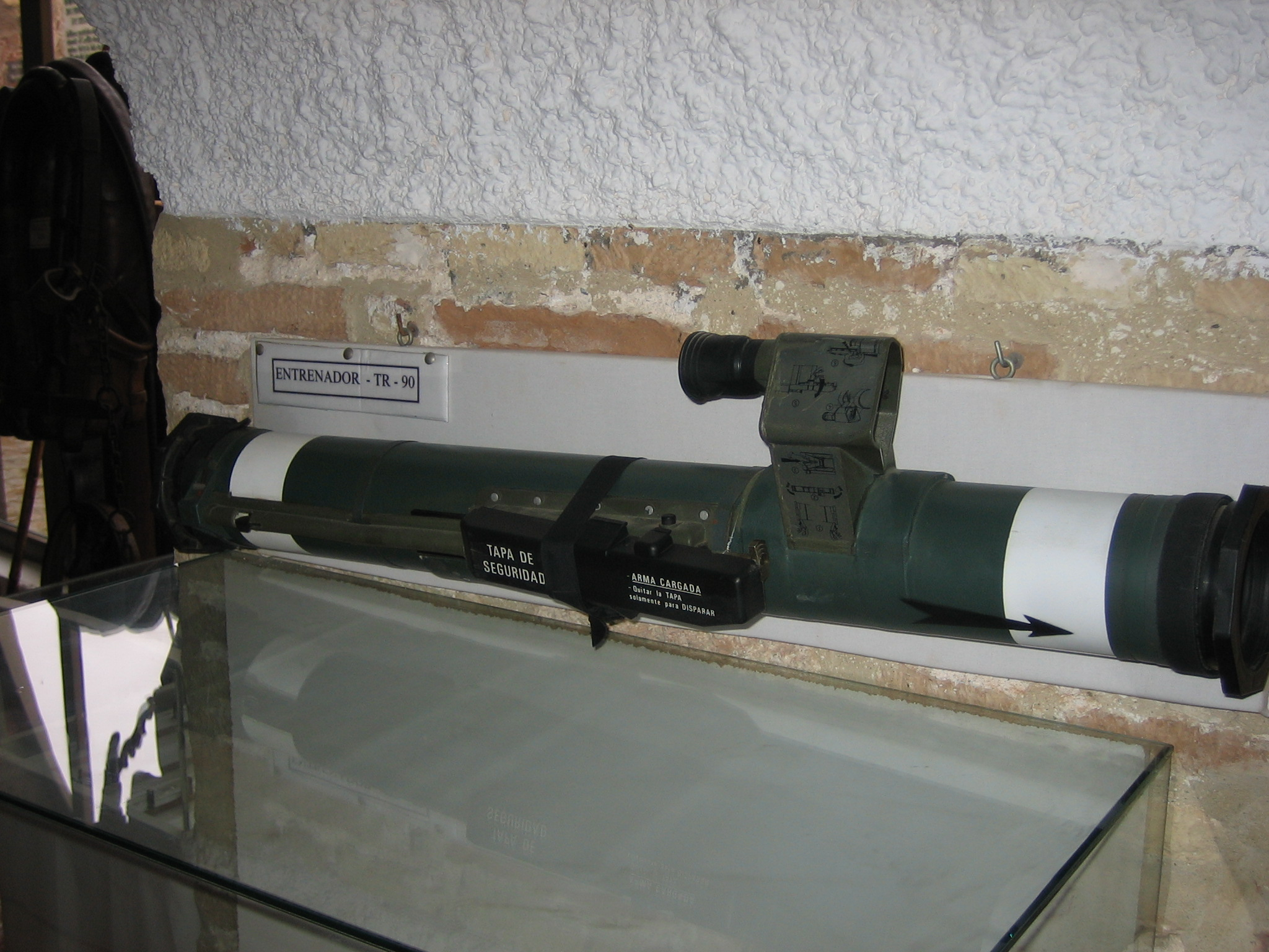 Museo Histórico Militar de Ceuta